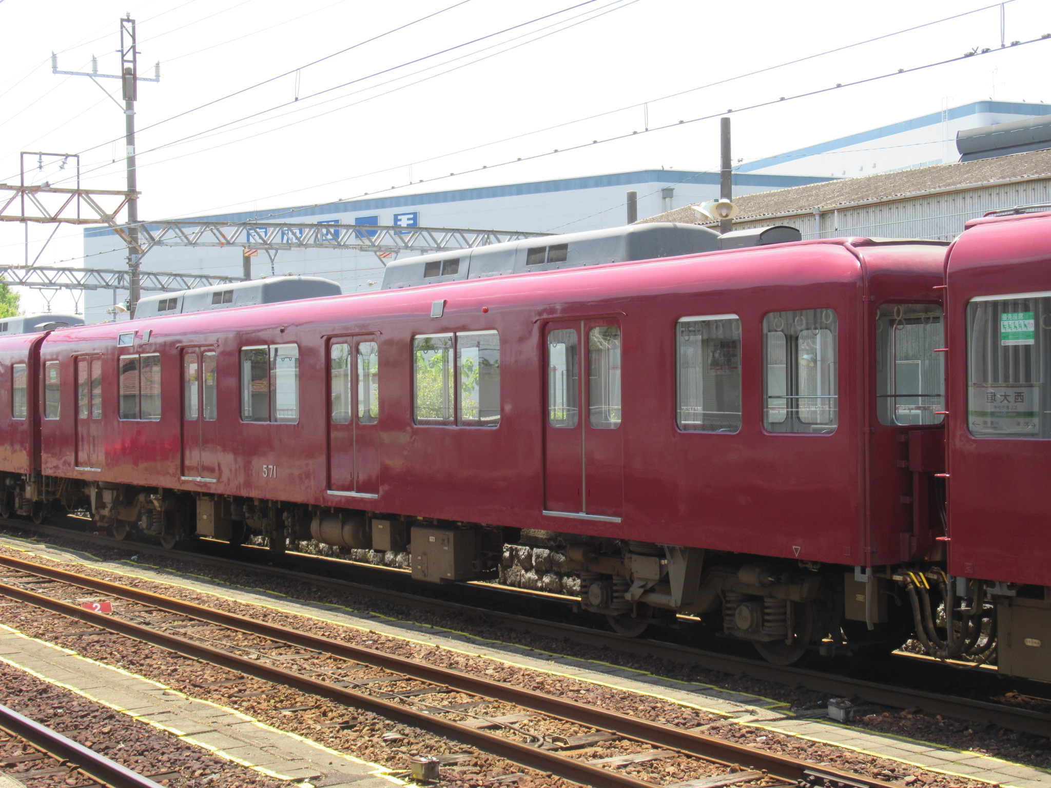 養老鉄道571 西大垣駅